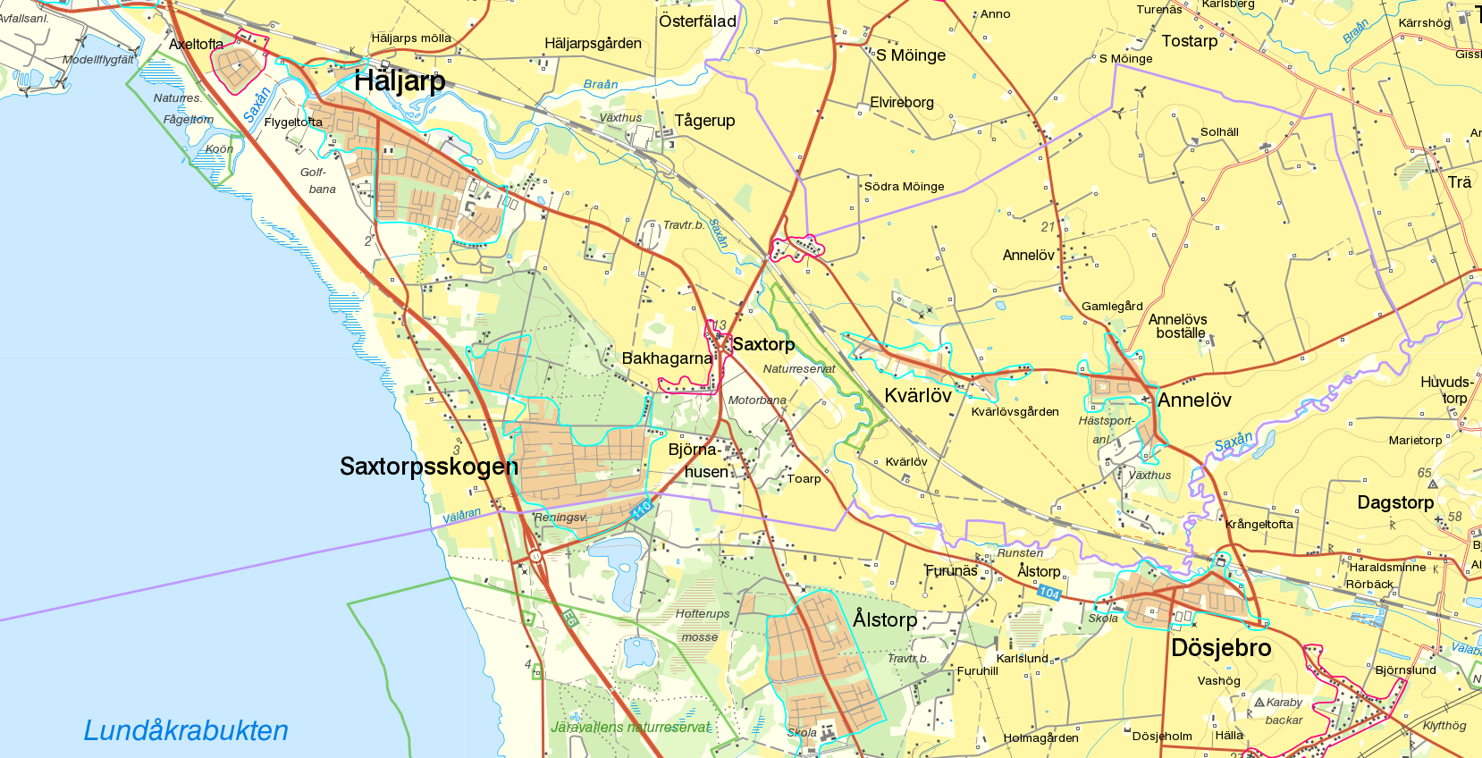 Småorten Saxtorp med gränserna från Statistiska centralbyråns småortsavgränsning 2005 i rosa. Tätorter 2005 i ljusblå. Bakgrundskarta från Lantmäteriet, skala 1:30 236.